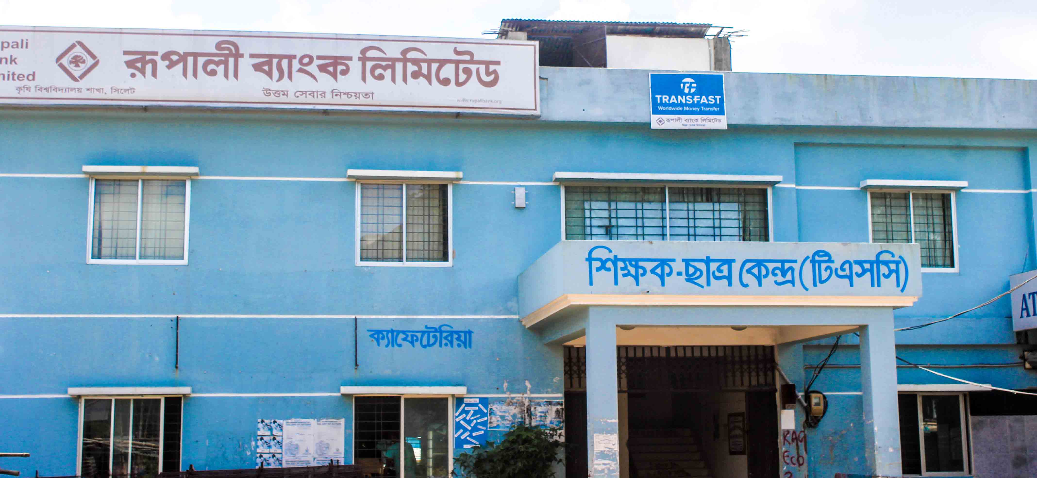 শিক্ষক-ছাত্র কেন্দ্র (টিএসসি), সিলেট কৃষি বিশ্ববিদ্যালয়।